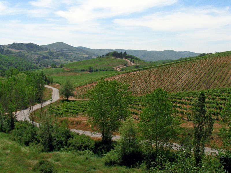 radda in chianti, siena, italy